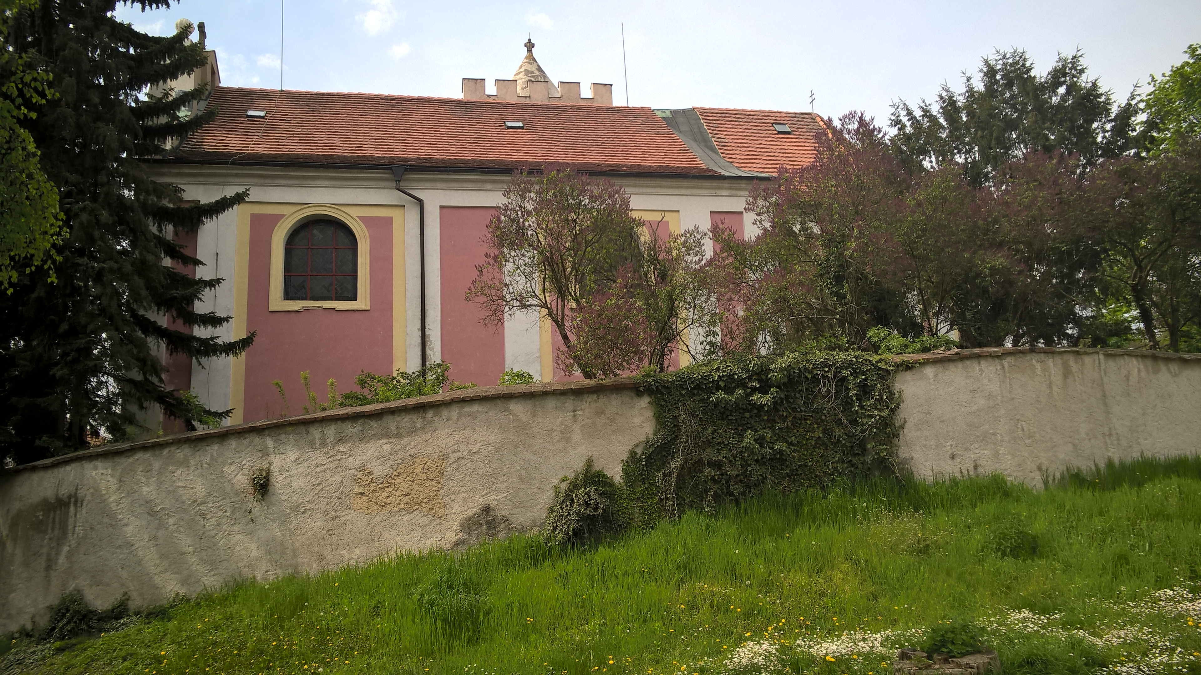 Kostel svatého Havla, Čečelice.